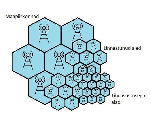 Kärgede poolitamine kärgvõrgus.